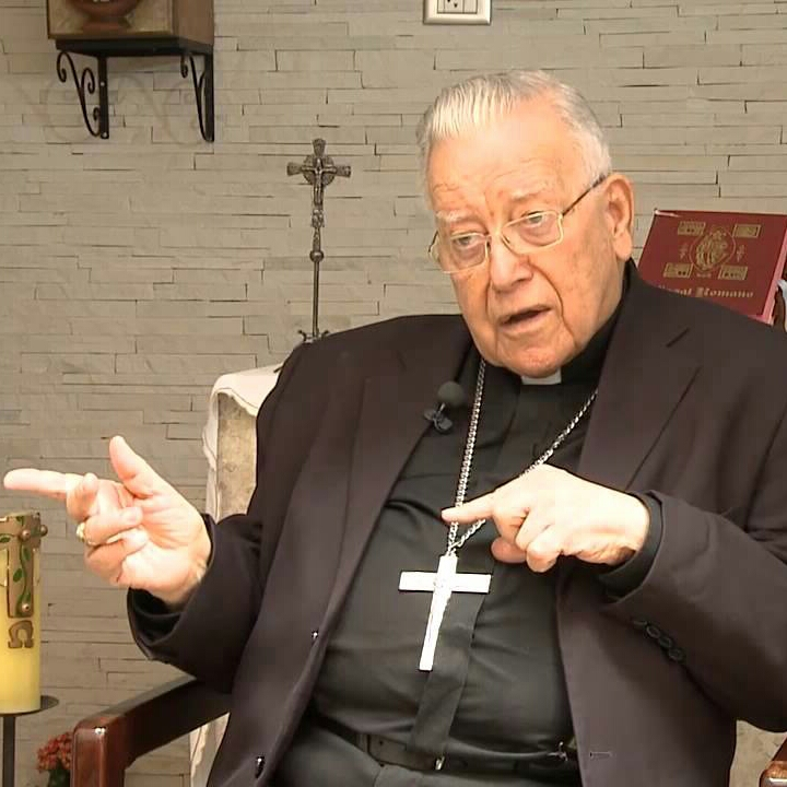 Bispo